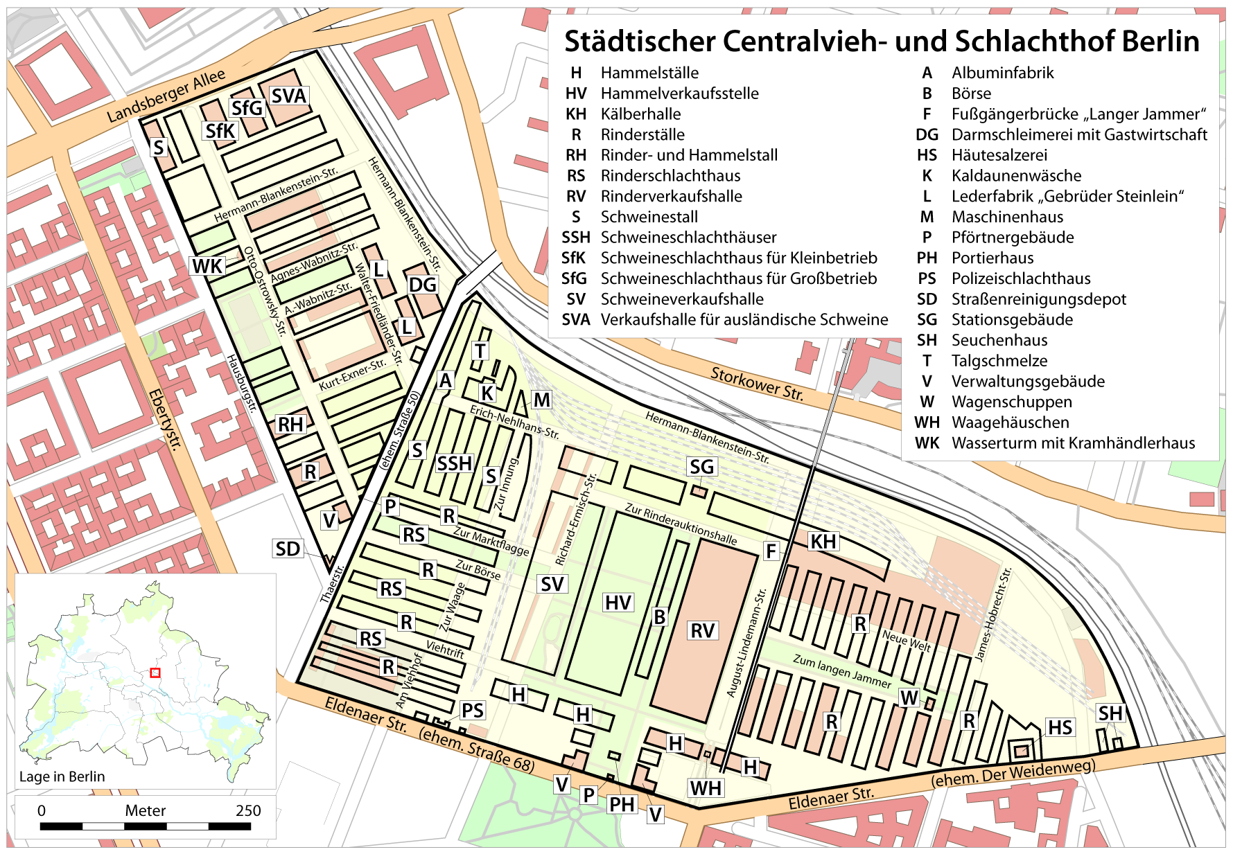 Karte des Städtischen Centralvieh- und Schlachthofs in Berlin. Die historische Bebauung (Zustand 1881-1945, teilweise bis 1990) ist in schwarz über der aktuellen Bebauung 2009 dargestellt.